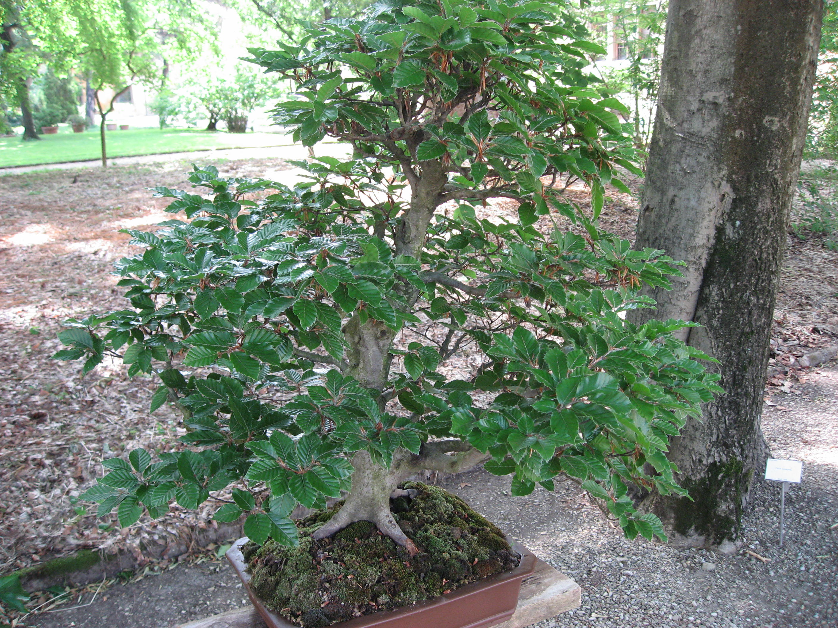 Fagus sylvatica Bonzai in Giardino dei Semplici di Firenze Map: 43° 46' 45" N 11° 15' 39" E